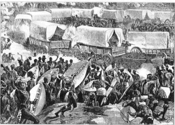 Bataille de Blood River. Gravure du XIXème siècle.